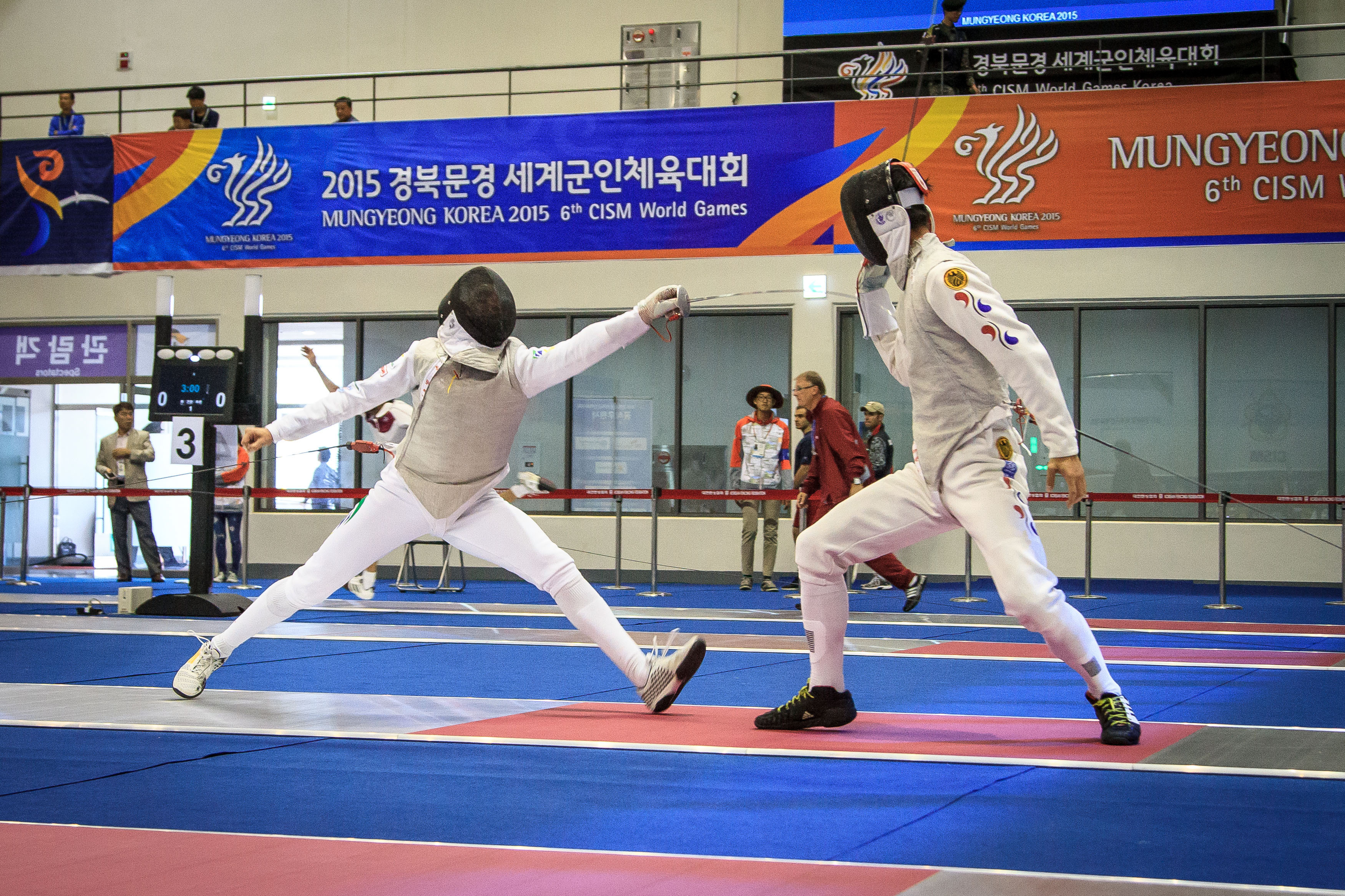 Fase elimiatória da esgrima (florete) em Mungyeong. Foto: Sgt Johnson Barros